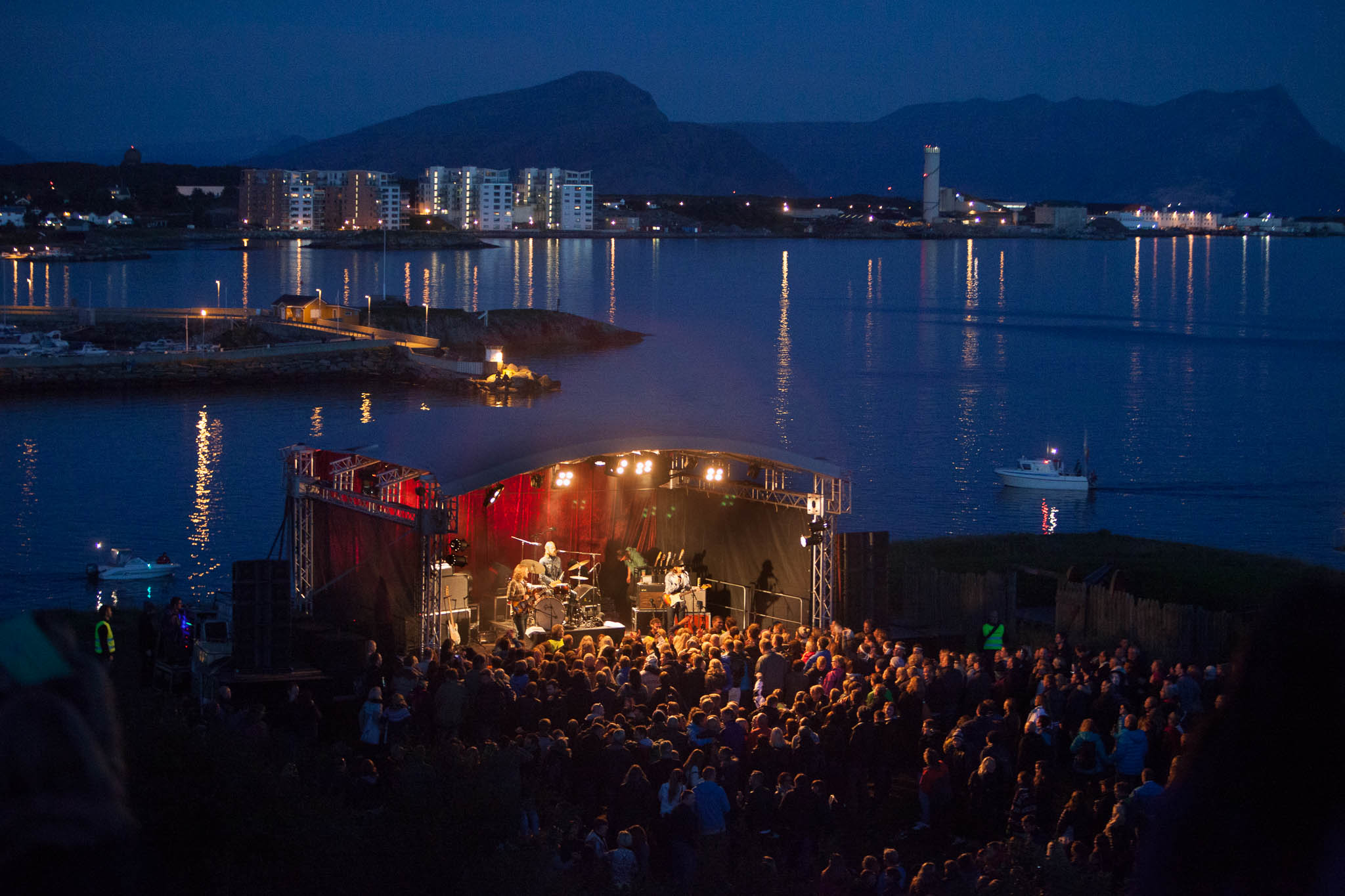 Bandet Big Bang opptrer på Nyholmen Skandse under Nordland musikkfestuke 2013